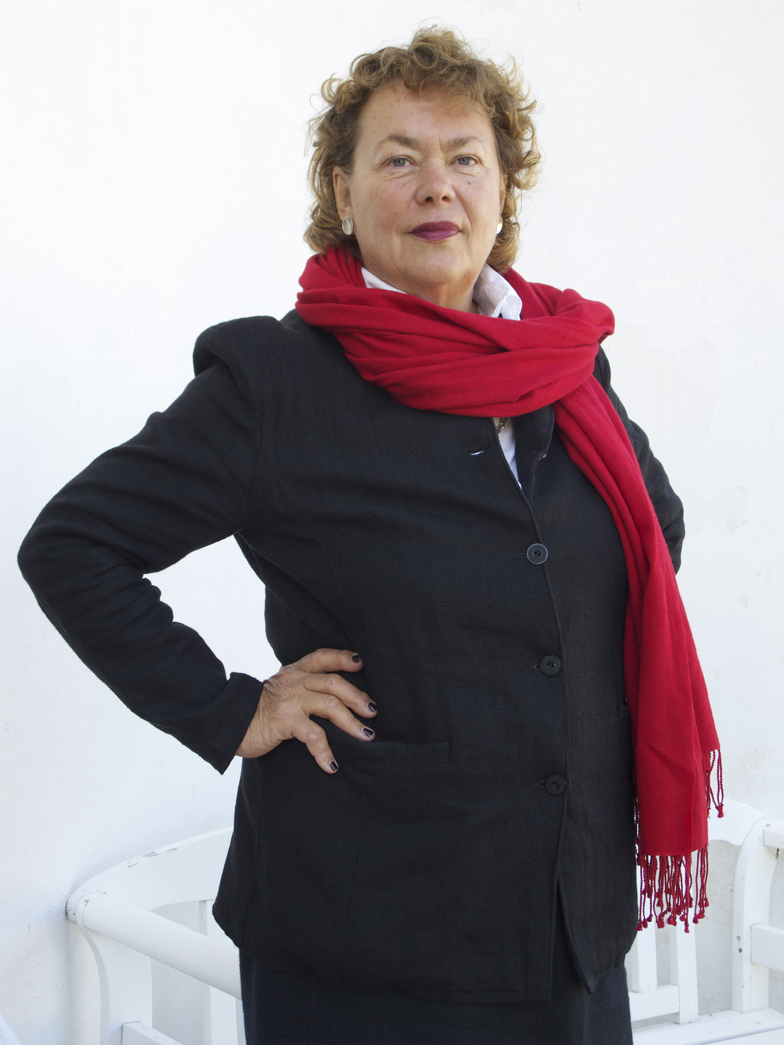 Marika Wachtmeister, Grundare Stiftelsen Wanås Utställningar